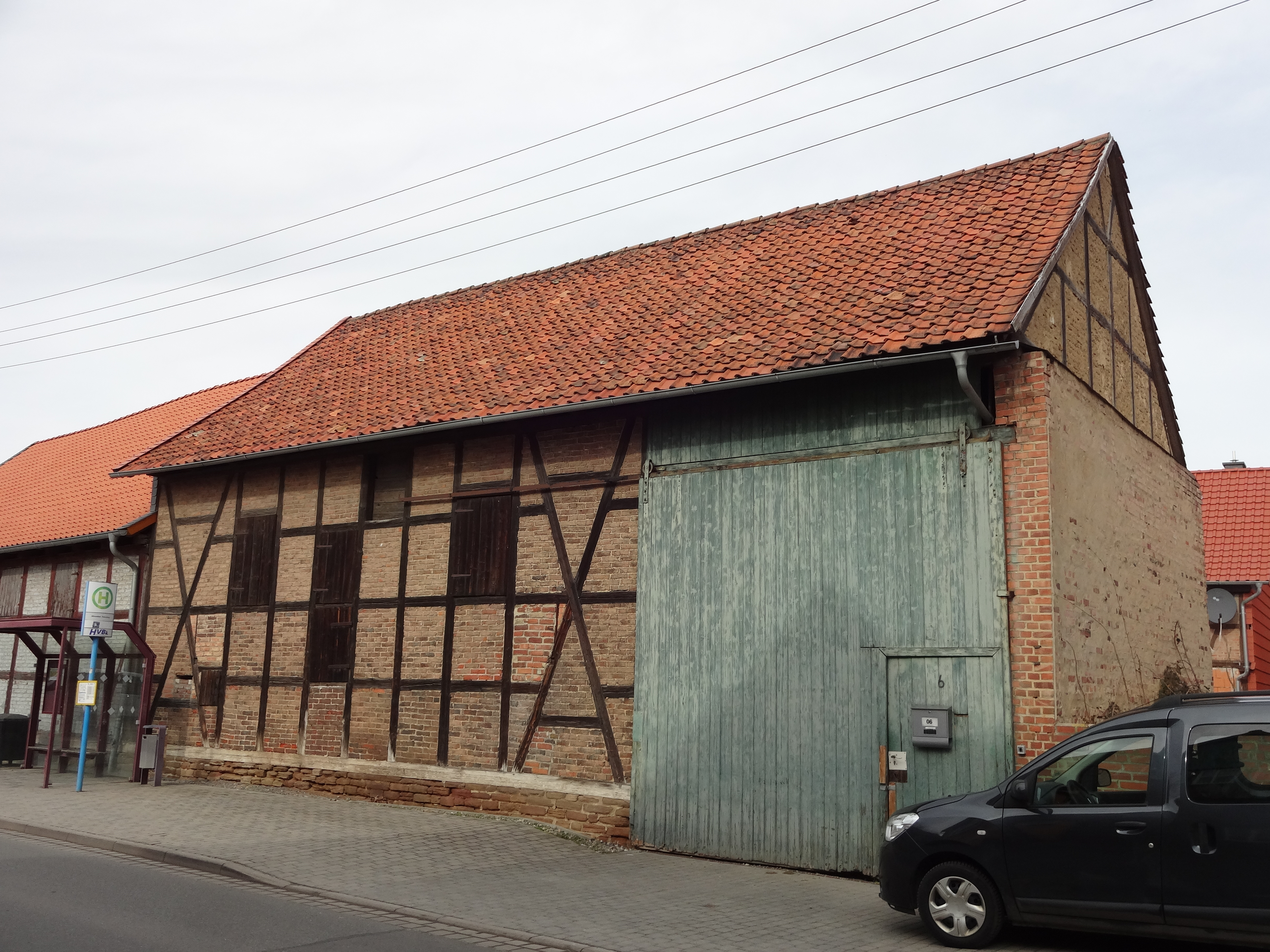 Kulturdenkmal in Minsleben, Ortsteil von Wernigerode